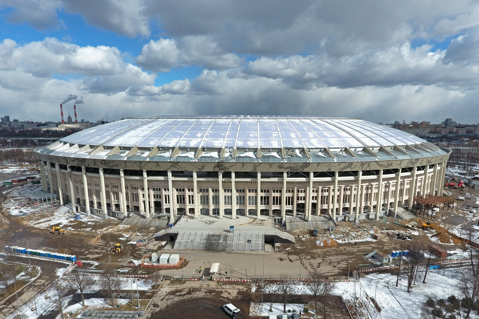 Реконструкция стадиона «Лужники» в Москве.